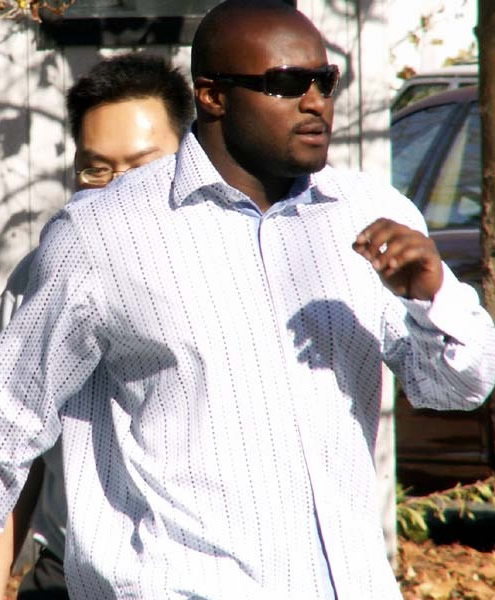 LaMont Jordan